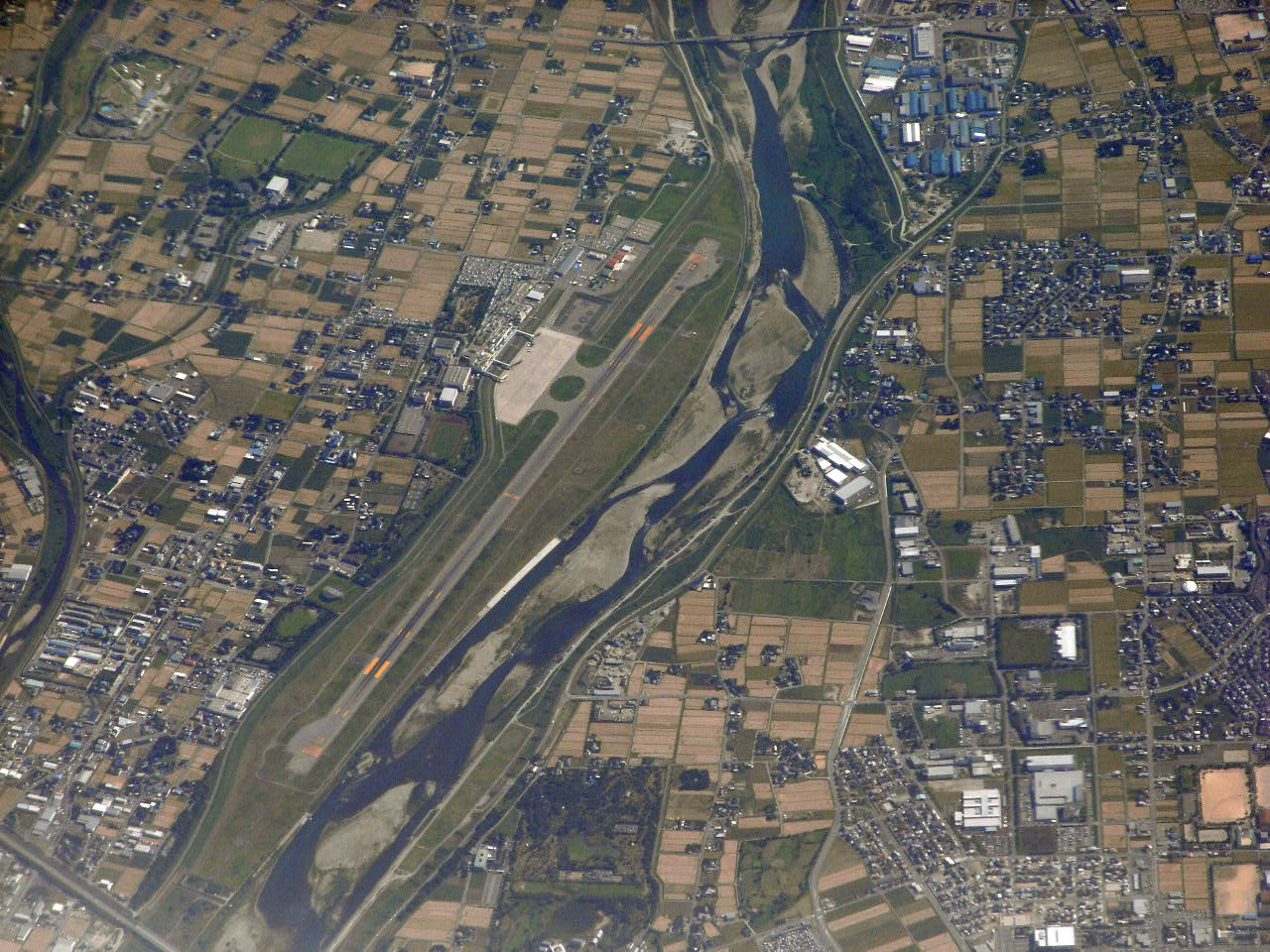 富山空港空撮画像